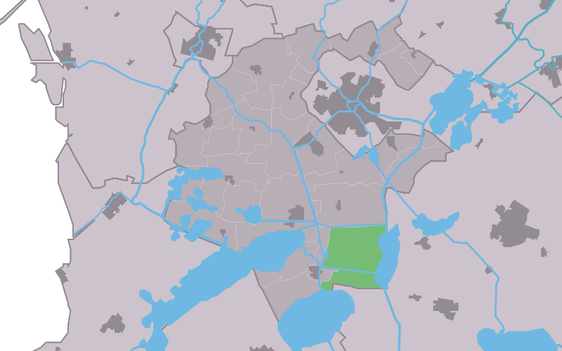 Kaartsje fan himrik fan Koufurderrige